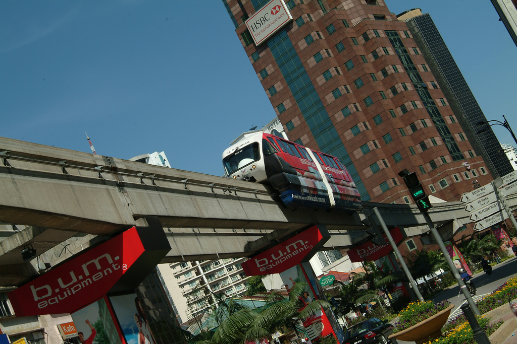 KL Monorail - Kuala Lumpur, Malaysia